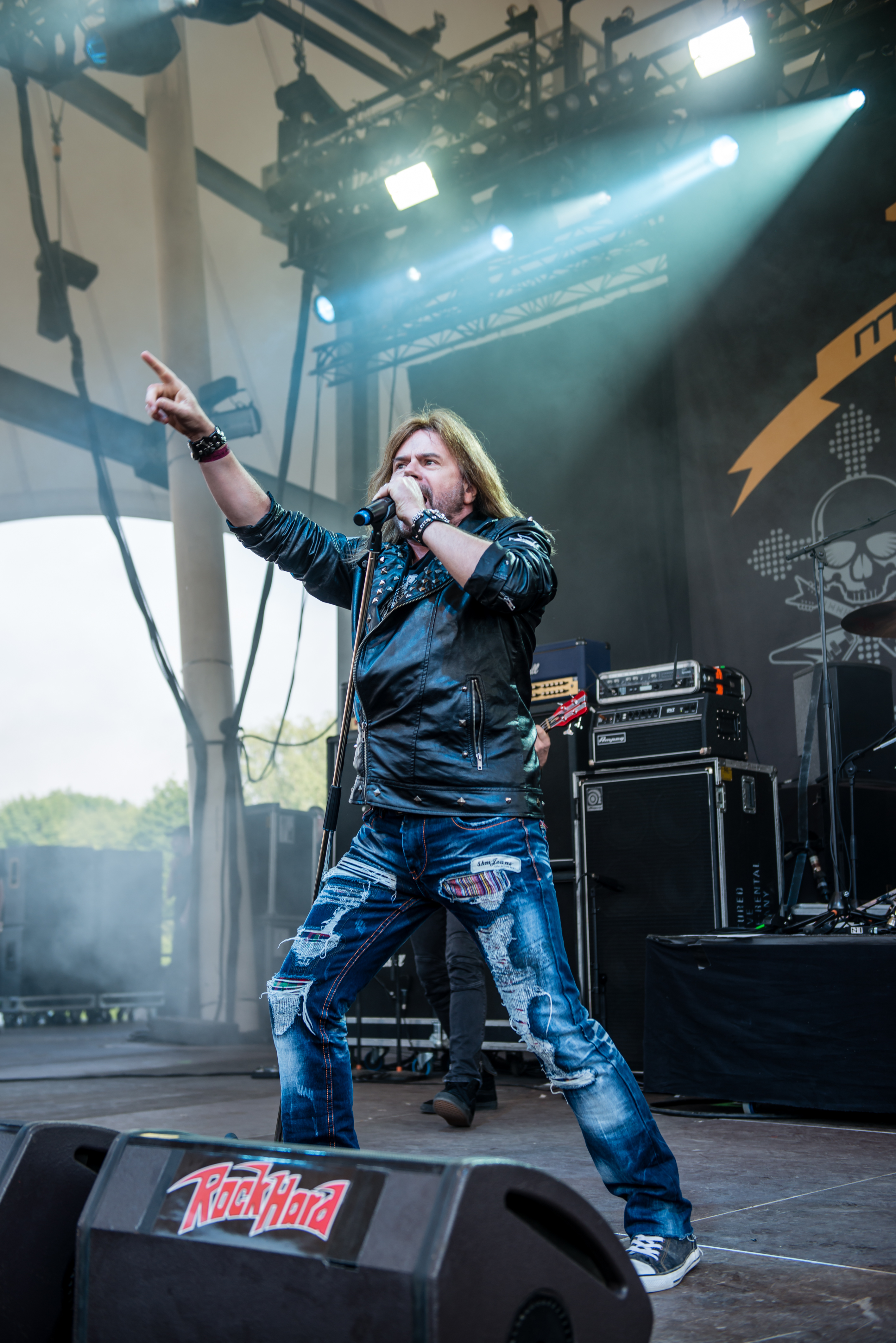 'Rock Hard Festival 2015; Gelsenkirchen Amphitheater': ' Michael Schenker's Temple of Rock'